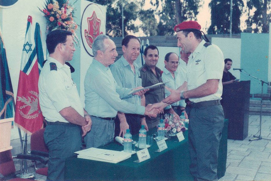 מוטי יוגב סיום המכללה לביטחון לאומי